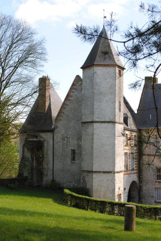 Château de Lucheux